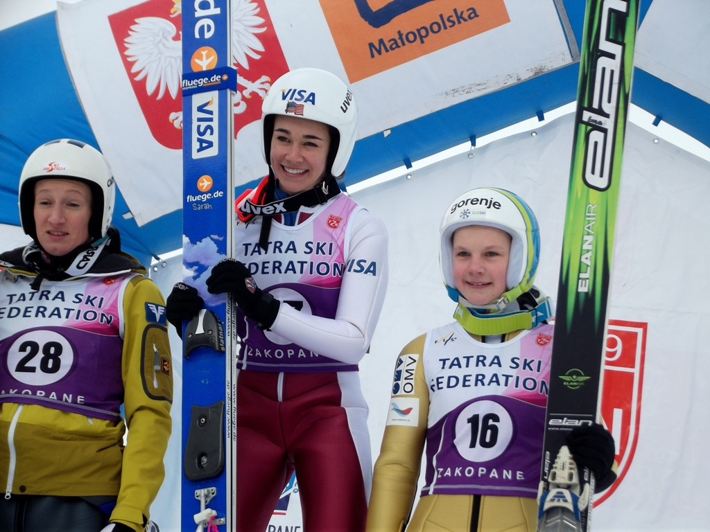 Zdjęcie zrobione podczas zawodów Pucharu kontynentalnego Kobiet w Skokach Narciarskich na Średniej Krokwi w Zakopanem.